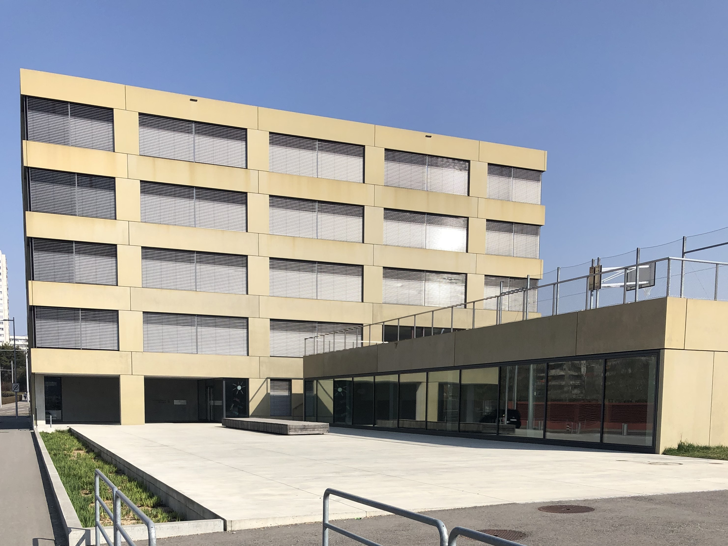 Schule Brünnen